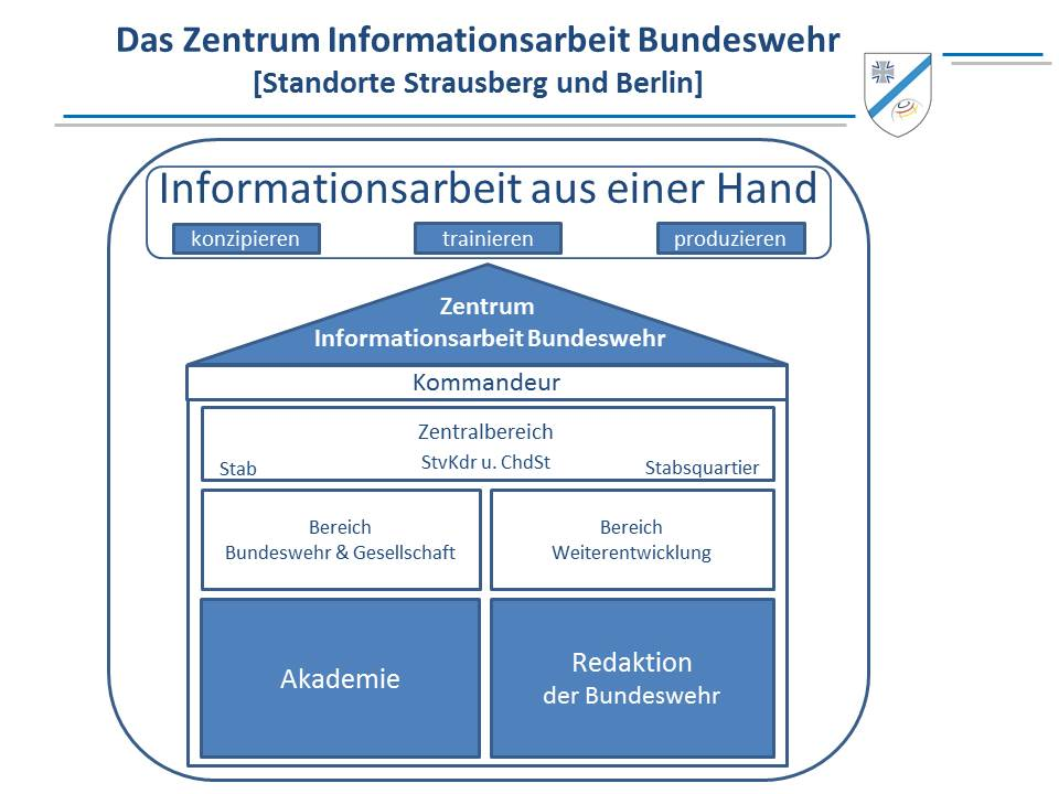 Zentrum Informationsarbeit Bundeswehr ist das reorganierte und umbenannte Kompetenzzentrum der Informationsarbeit der Bundeswehr hervorgegangen aus der Akademie der Bundeswehr für Information und Kommunikation.